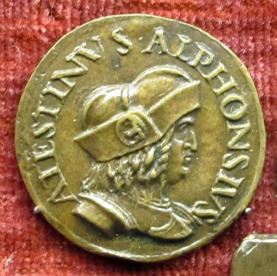 Medaglia di Alfonso I d'Este (1476-1534), recto